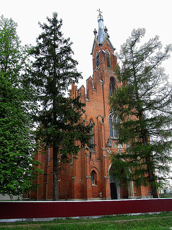 Костел Св.Анни: Неоготичний костел Св. Анни (1875 р.), с. Озеряни, Борщівський район, Тернопільської області.